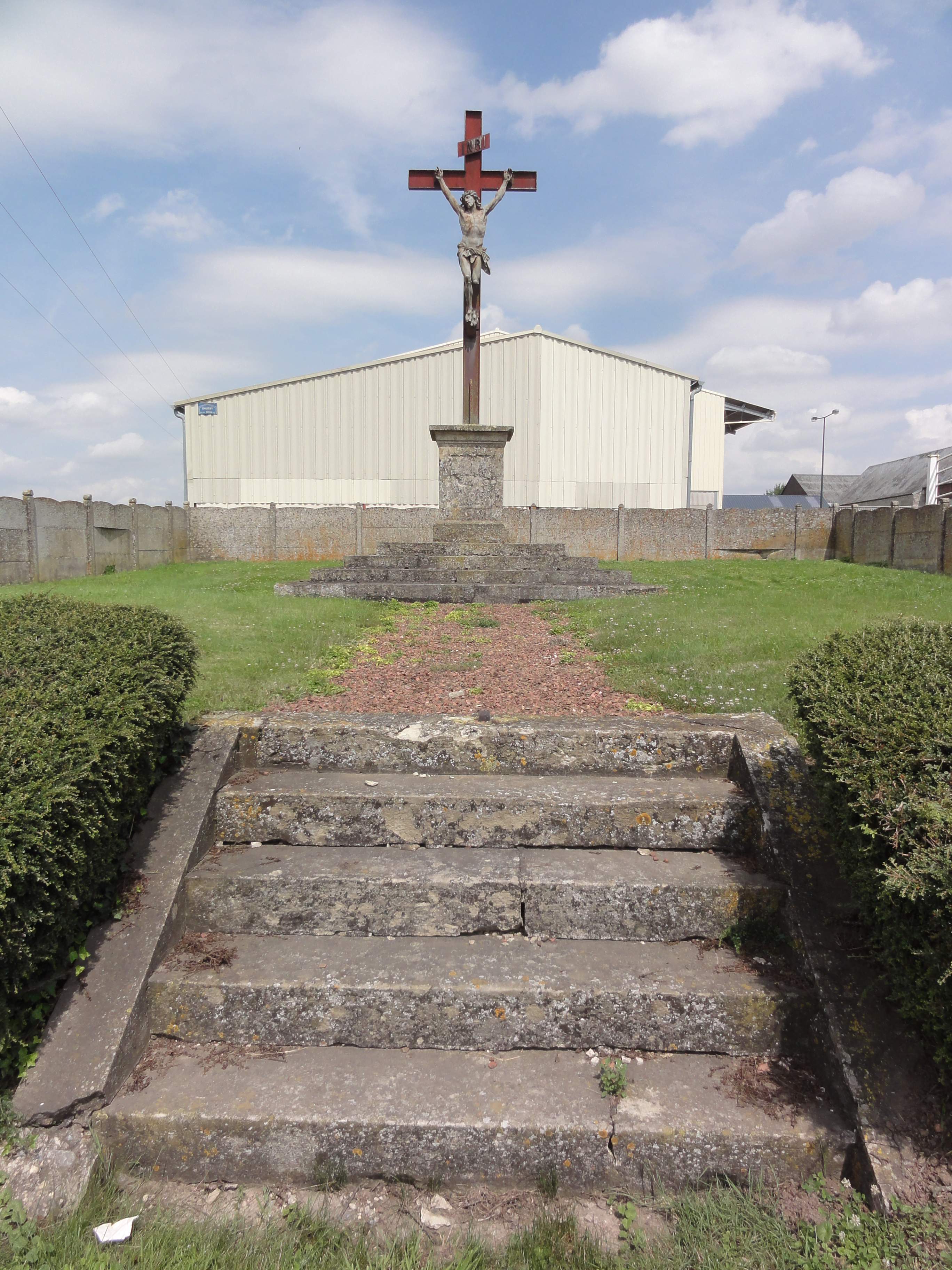 Aubencheul-aux-Bois (Aisne) croix de chemin